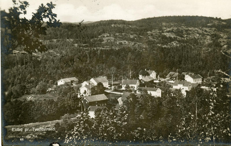 Foto av gården